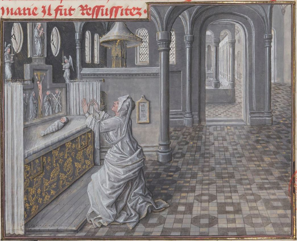 Vie et miracles de Notre Dame, en prose française, arrangés par Jean MIÉLOT pour le duc Philippe le Bon, Flandre, milieu du XVe siècle - Paris, BnF, département des Manuscrits, Français 9199, fol. 38v.